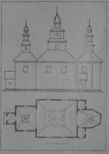 Беларуская (тарашкевіца): Царква Сьв. Параскевы Пятніцы ў Мазыры